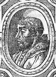 Le poète Maurice Scève (1500 - 1560)